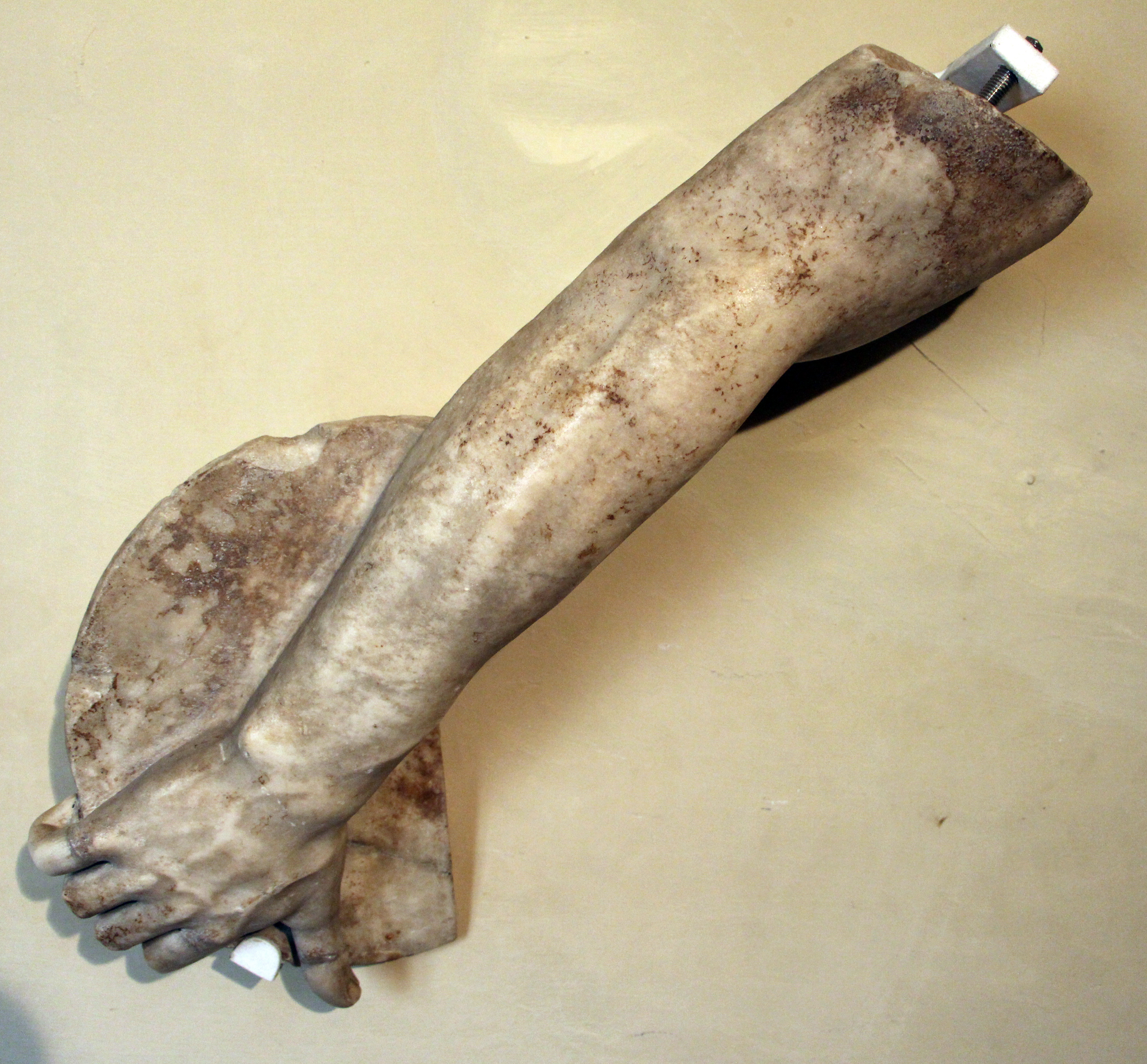 Casa Buonaroti